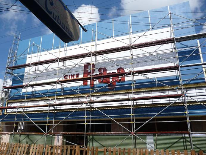 Cine-teatro Praga en Pinar del Río, Cuba